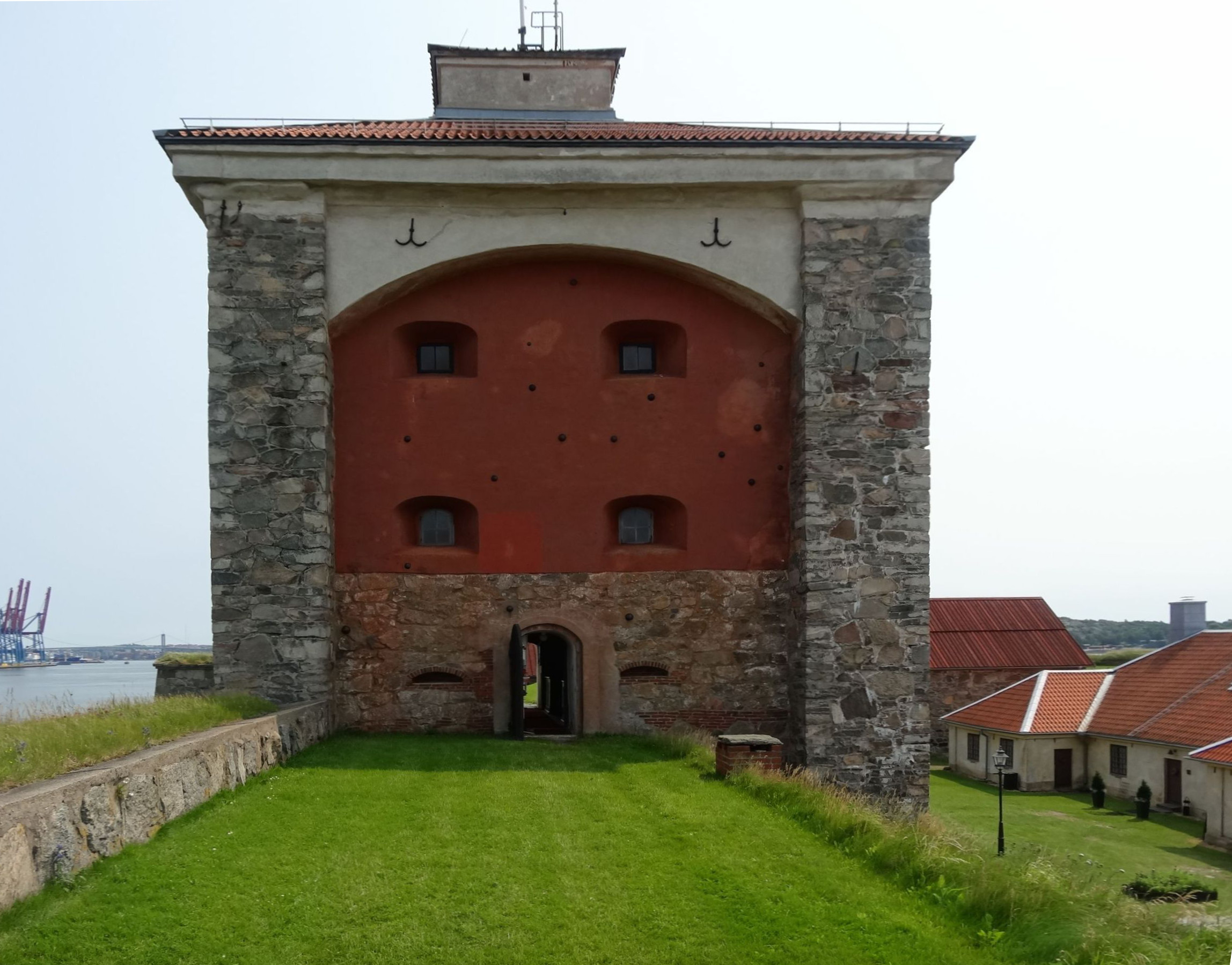 Ingången till fästningskyrkan från vallgången på kurtin 11. Att mittendelen av västra tornväggen inte har genomgått större förändringar sedan tidigt 1700-tal syns, då kanonkulor från 1719 fortfarande sitter fast i tornet.